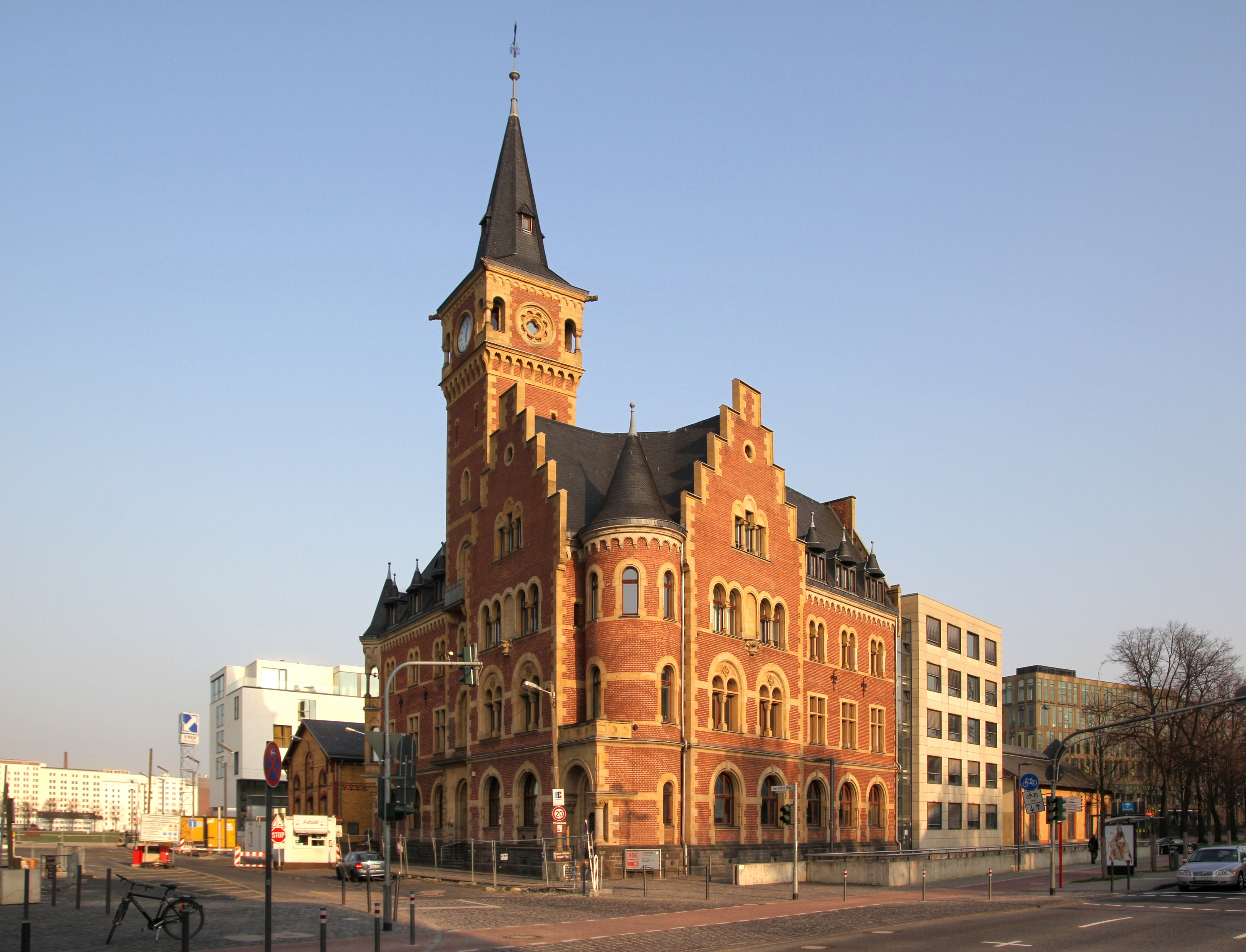 Altes Hafenamt im Kölner Rheinauhafen, Denkmalliste #122 This is the photograph of an architectural monument. It is part of the list of cultural monuments of Köln, no. 122